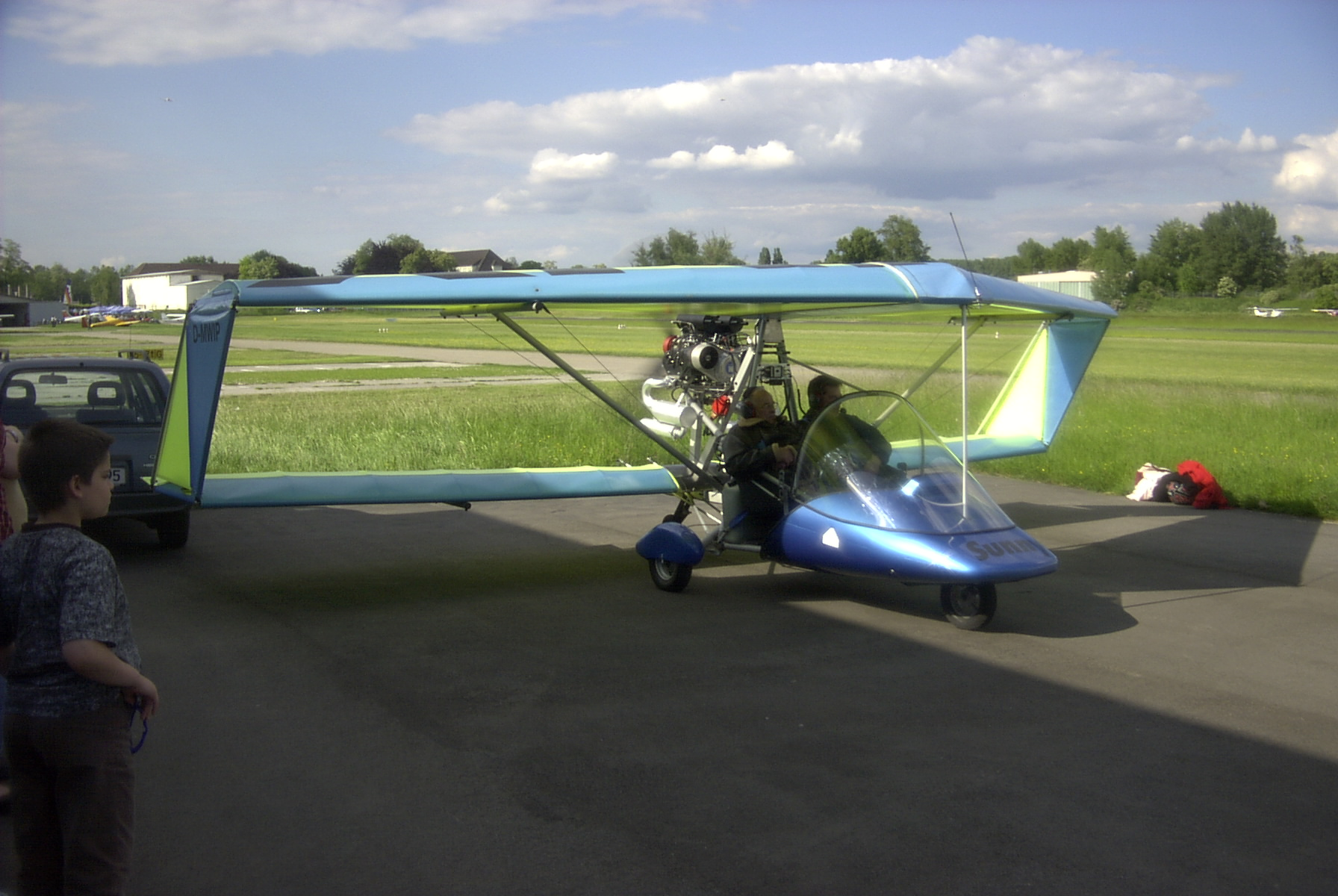 Sunny Side-by-Side